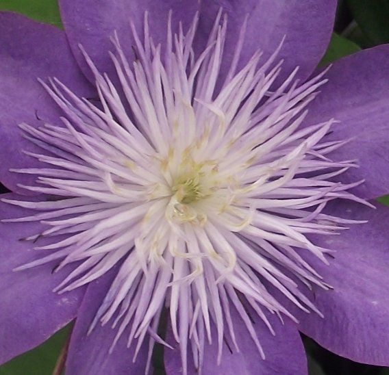 Stigmates de clematite evipo038